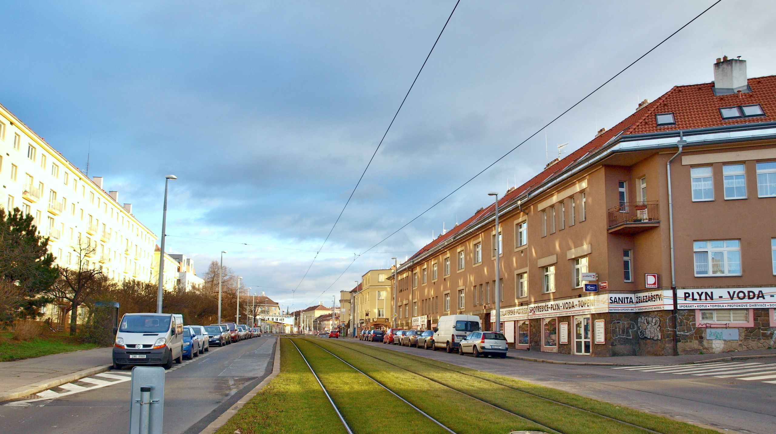 Ulice Průběžná v Praze Strašnicích